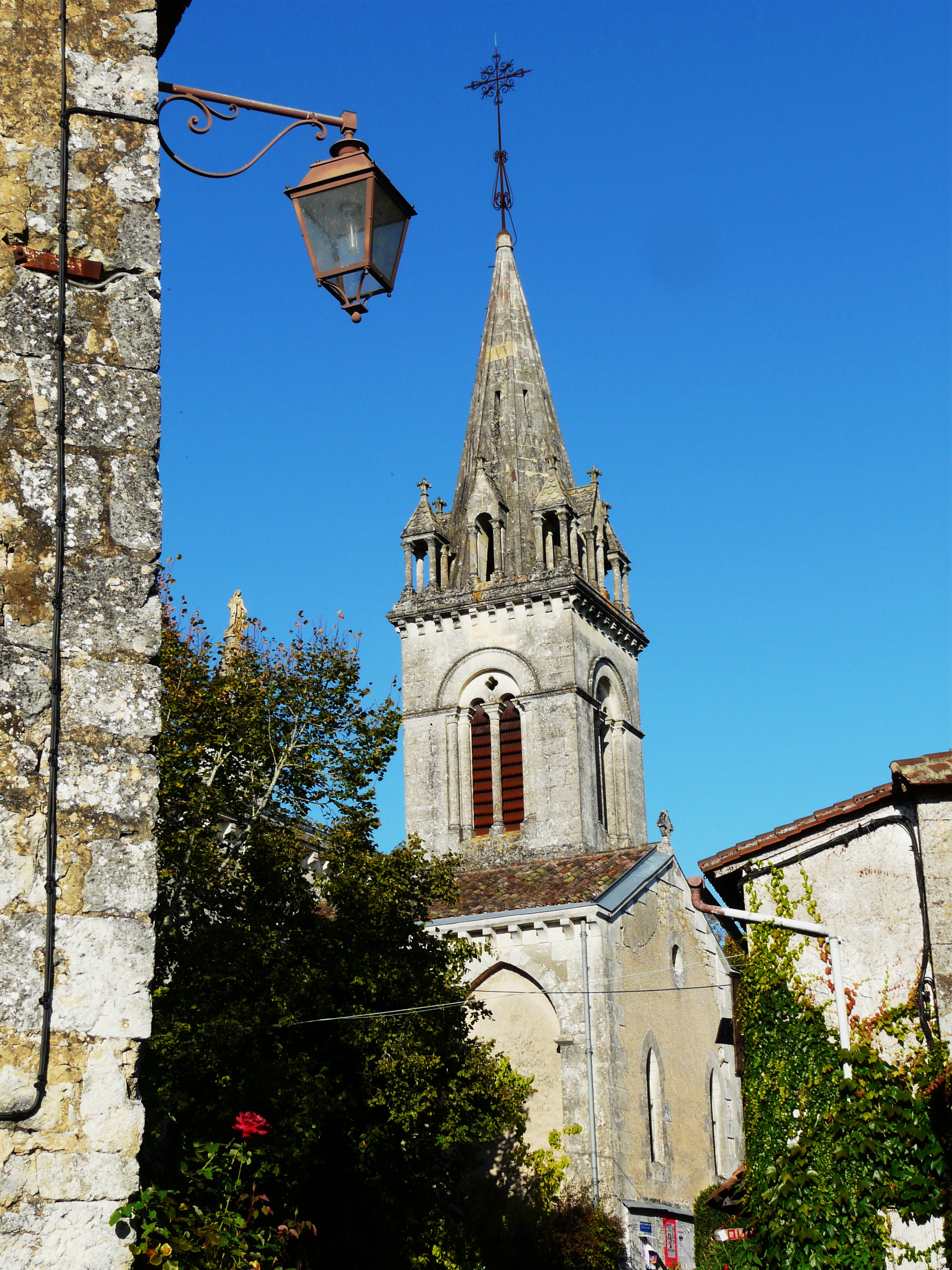 Église Saint-Front, Clermont-de-Beauregard, Dordogne, France